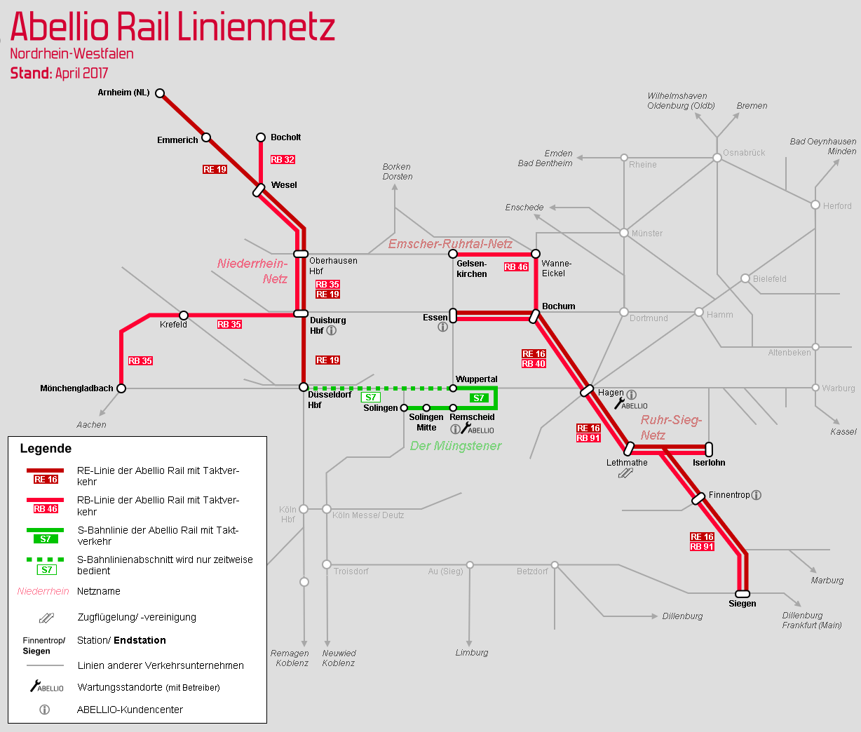 Liniennetz der Abellio Rail NRW, Stand: April 2017